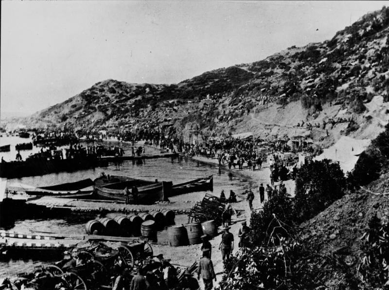 Türkei, Anzac-Bucht, Truppenlandung ADN-ZB Türkei: Ubz.: Eine Aufnahme aus dem Jahre 1915 während der Landung von Truppen der Alliierten in der Anzac Bucht auf Gallipoli (Türkische Halbinsel im Ägäischen Meer).